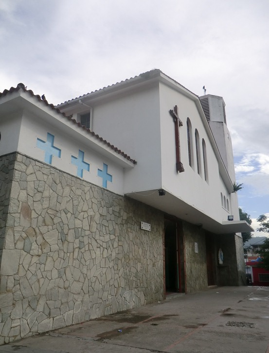 Fachada del Templo Parroquial de la ciudad de Guatire. Estado Miranda. Venezuela